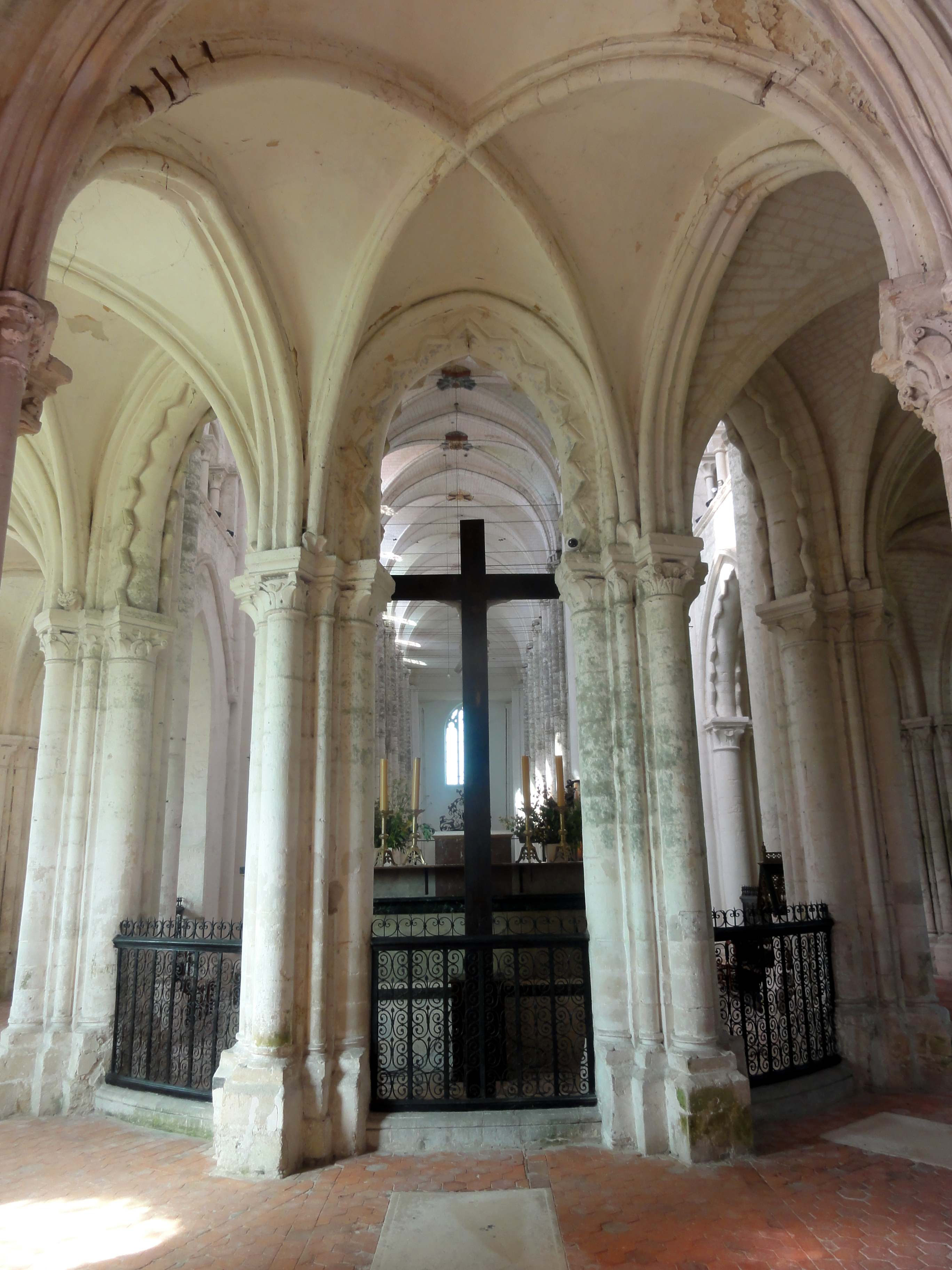 Déambulatoire de l'abbatiale et chapelles rayonnantes - voir le titre du fichier.